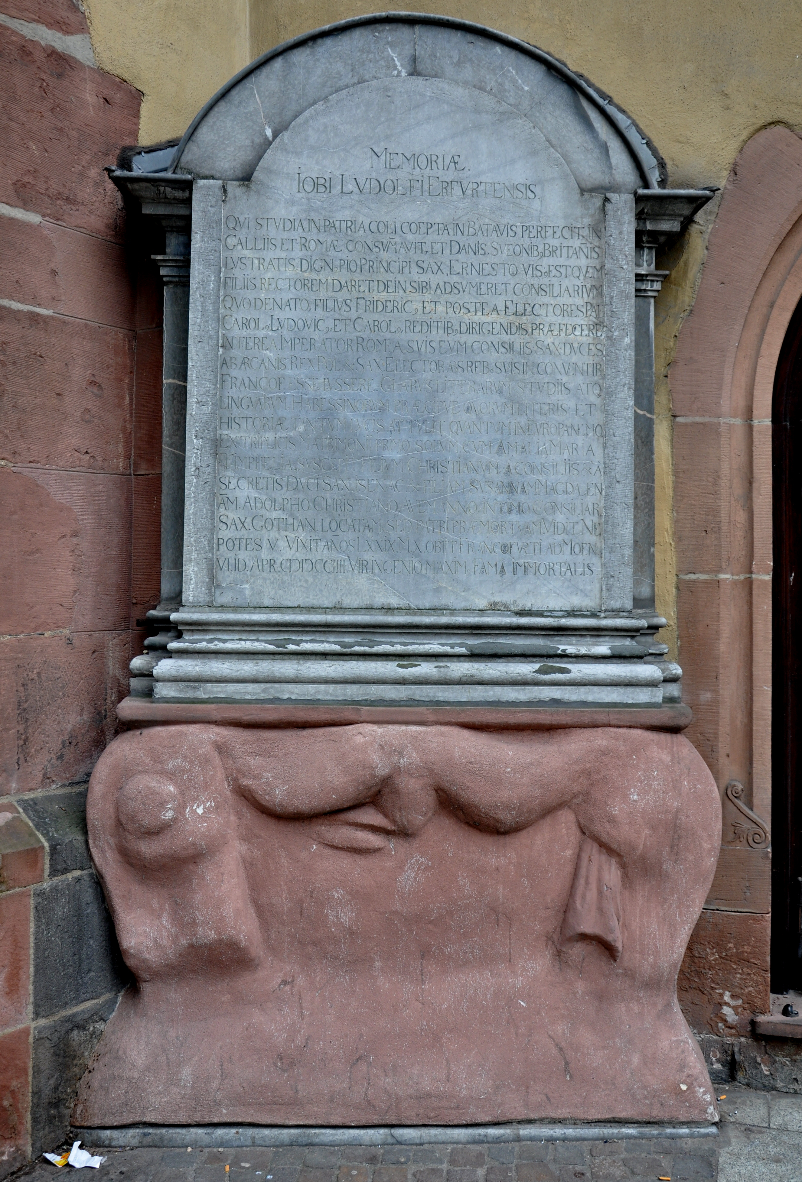 Frankfurt am Main, Katharinenkirche, Grabmal an der Außenwand Epitaph Hiob Ludolf zu Erfurt (Memoria Iobi Ludolfi Erfurtensis)